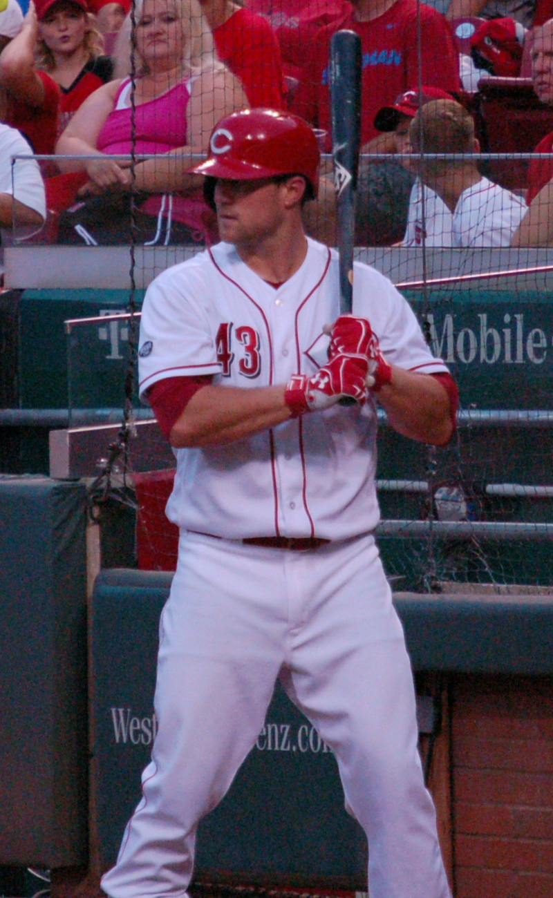 Scott Schebler